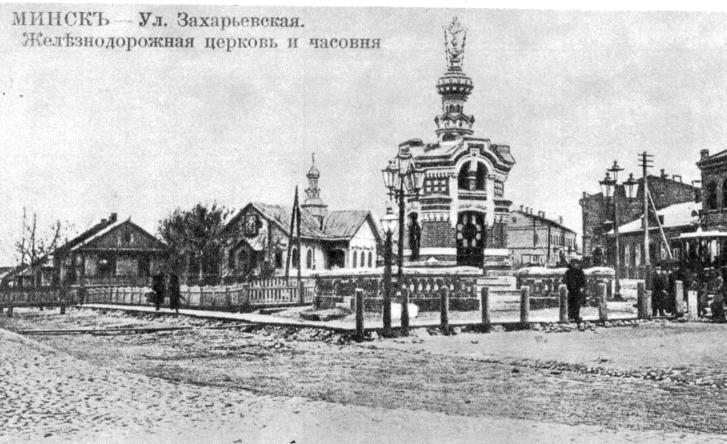 Вид захарьевской улицы в Минске. Начало XX в.